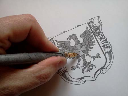 dessin à la plume des armoiries Geffroy de Villeblanche